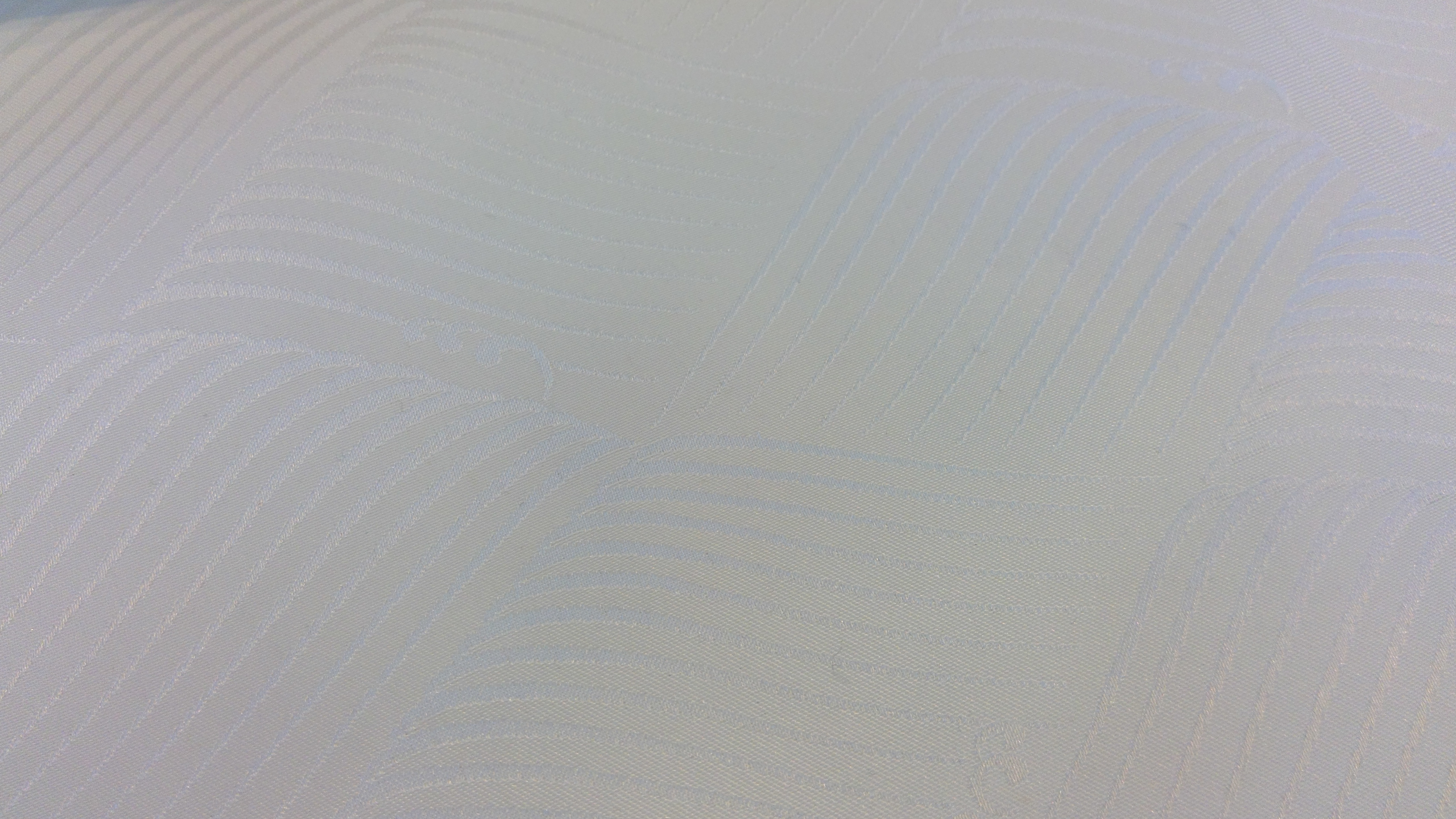 丹後ちりめんの後染め織物の布地